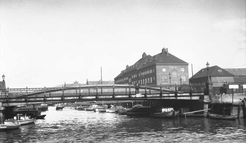 Bispebrua over Akerselva, ca 1925 - 1930